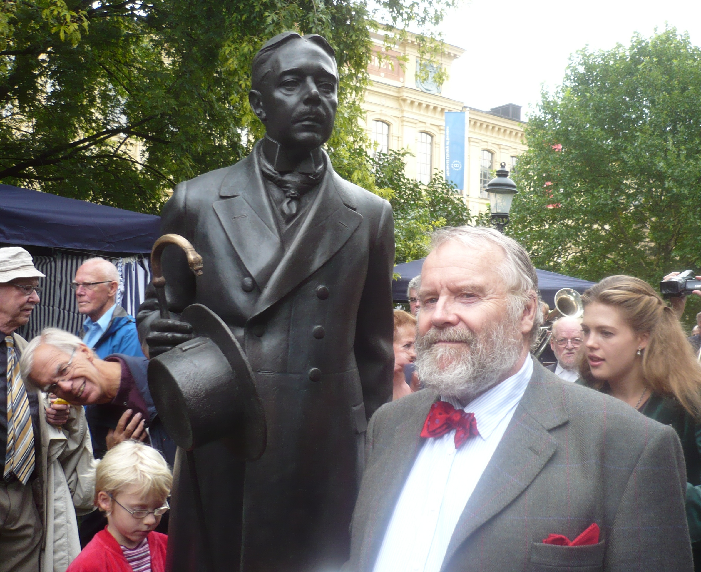 Nils O. Sjöstrand vid avtäckningen av Hjalmar Söderberg-statyn utanför Kungl. biblioteket i Humlegården den 11 september 2010.